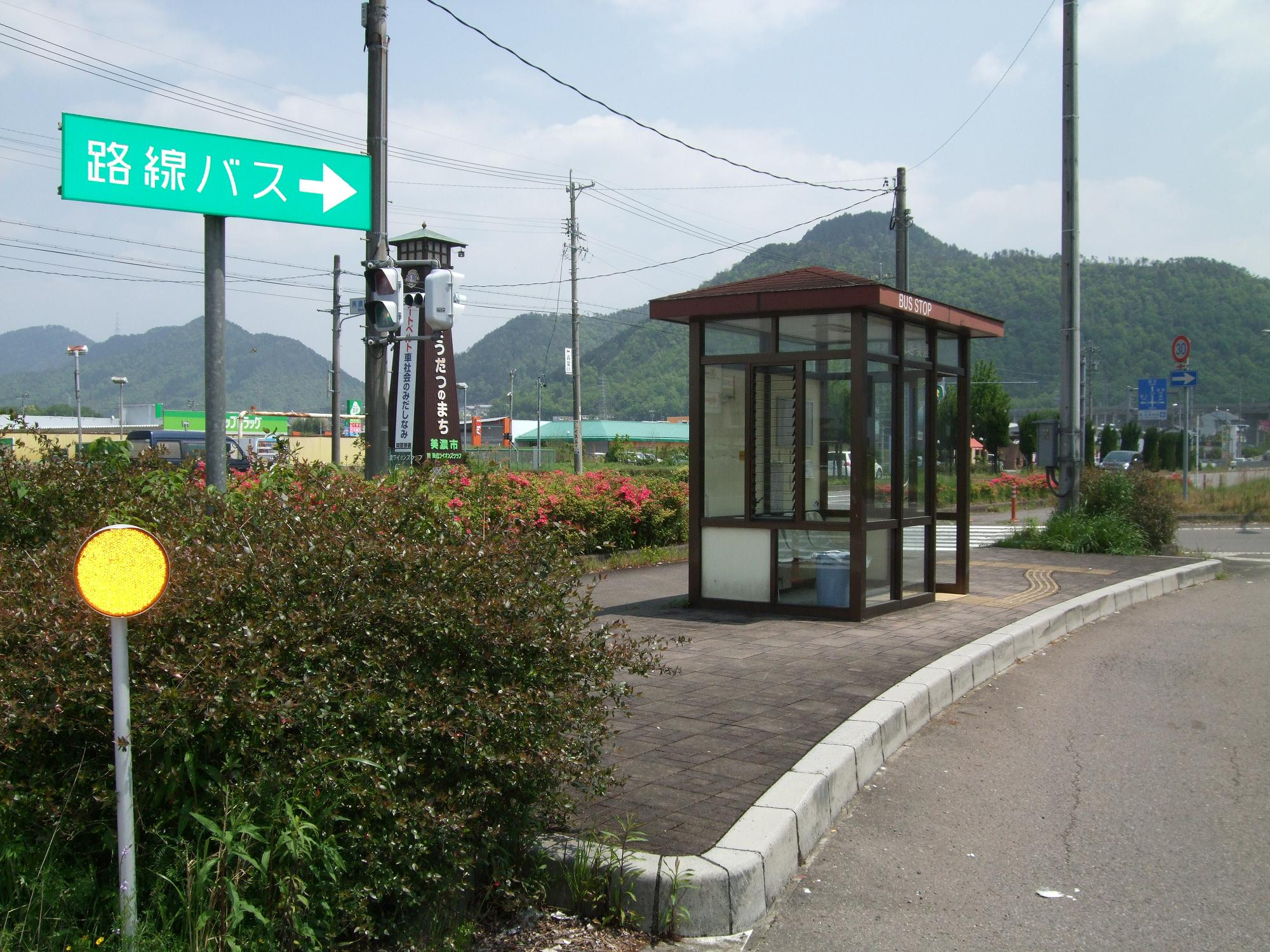 高速美濃バスストップ 美濃市街地方面を撮影 2008.4.27 投稿者が撮影